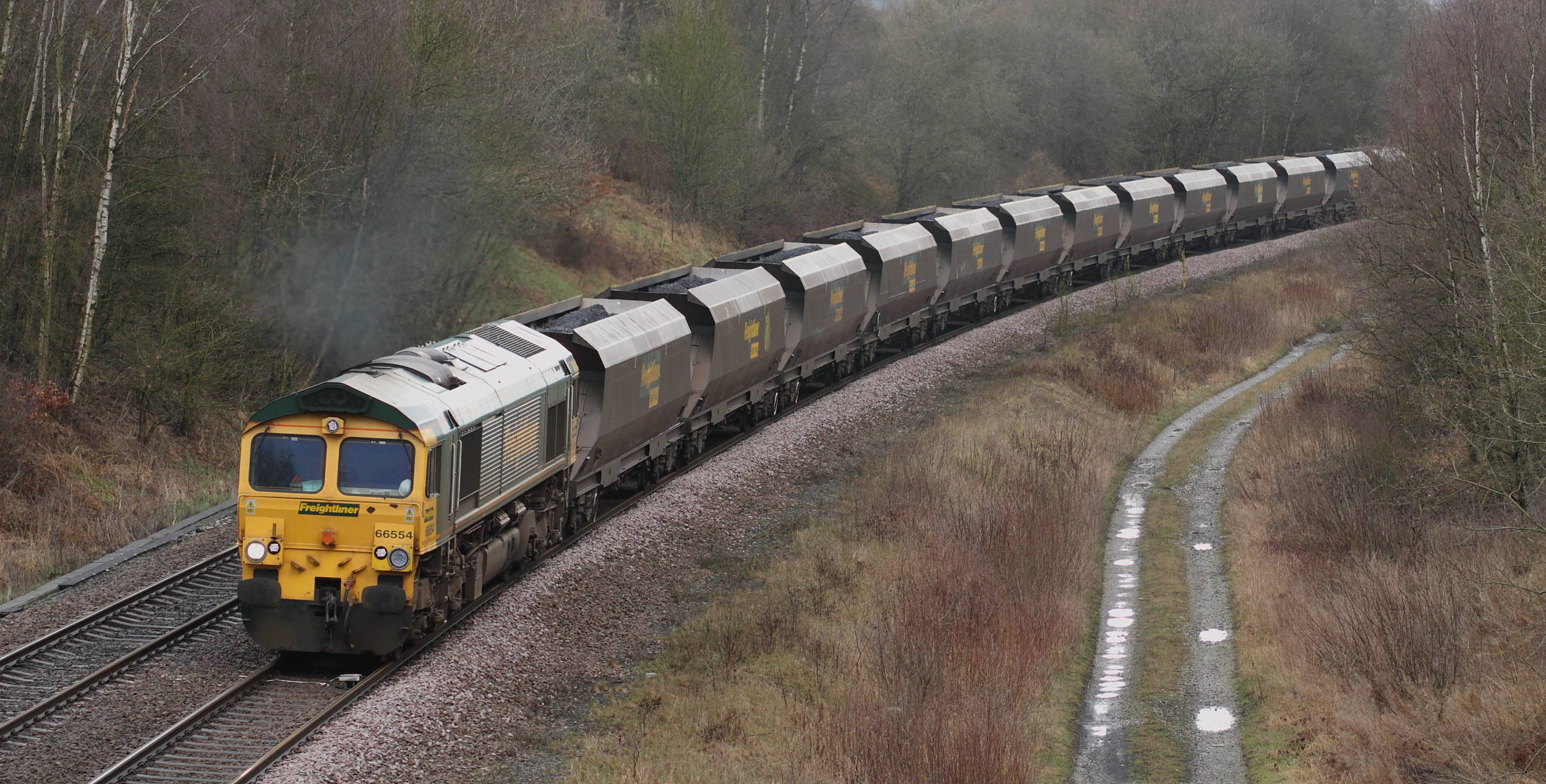 66554 , Morton